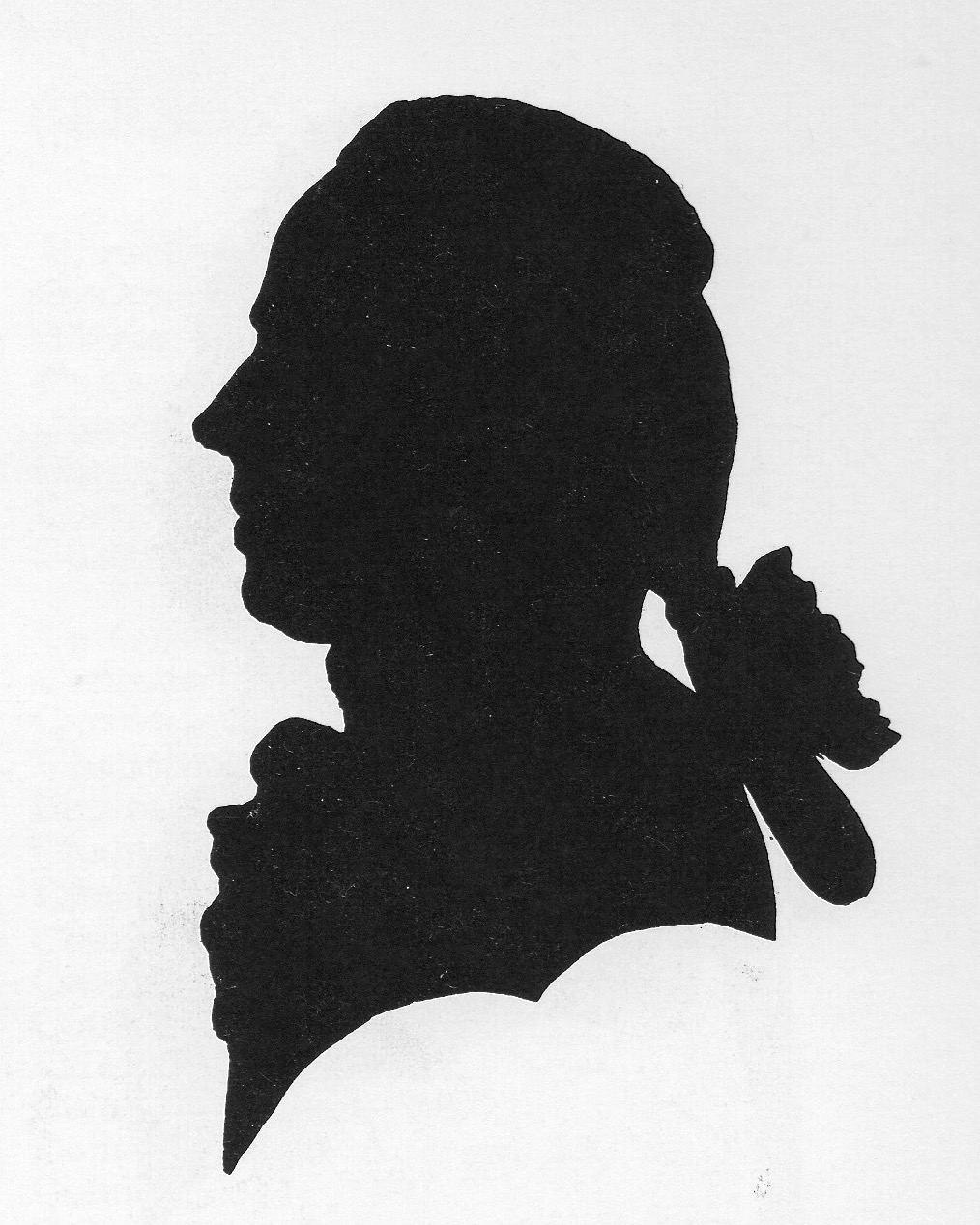 Bernhard Albrecht Moll (1743–1788): Der Wiener Künstler Johann Andreas Ziegler (1749–1802). Royal Ontario Museum, Toronto.